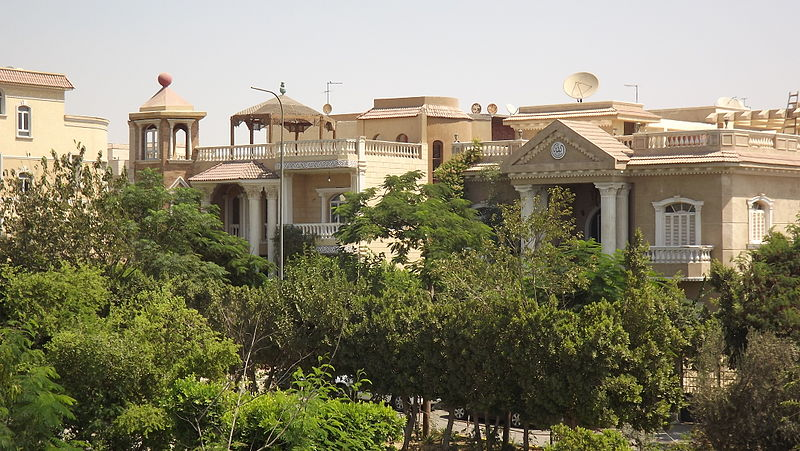 لقطات داخل مدينة العبور